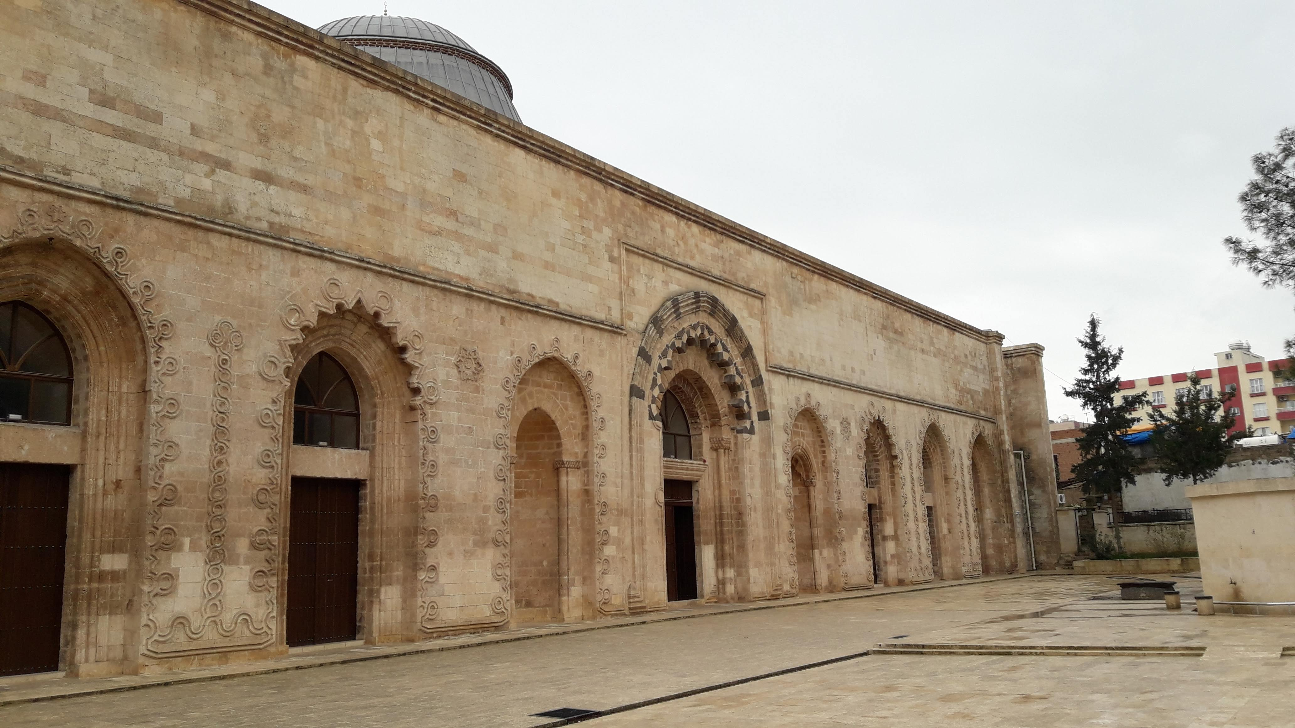 Kızıltepe'de bulunan Koçhisar Ulu Camii.